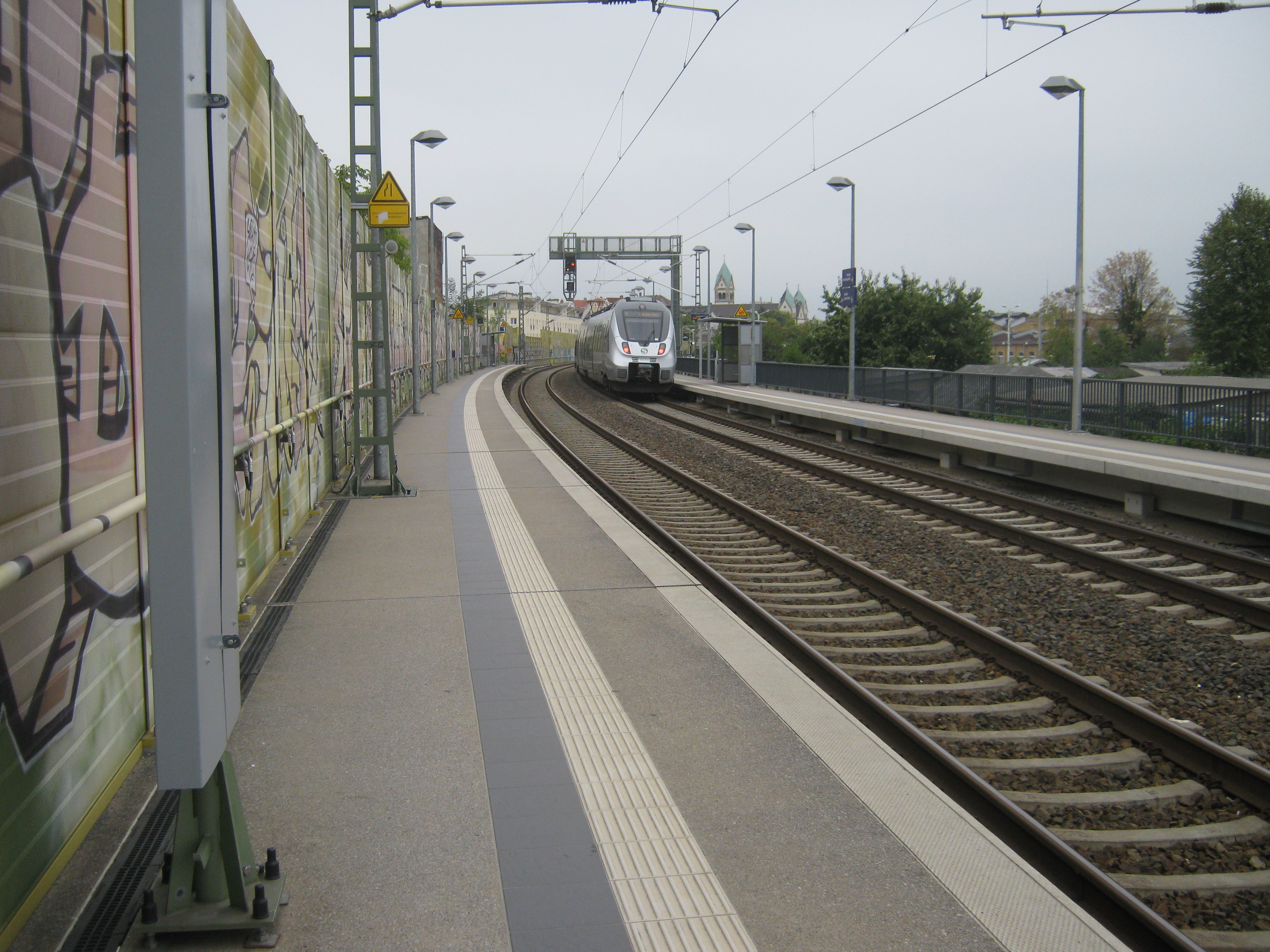 Blick auf den Haltepunkt Leipzig-Lindenau, einen Haltepunkt der S-Bahn Mitteldeutschland